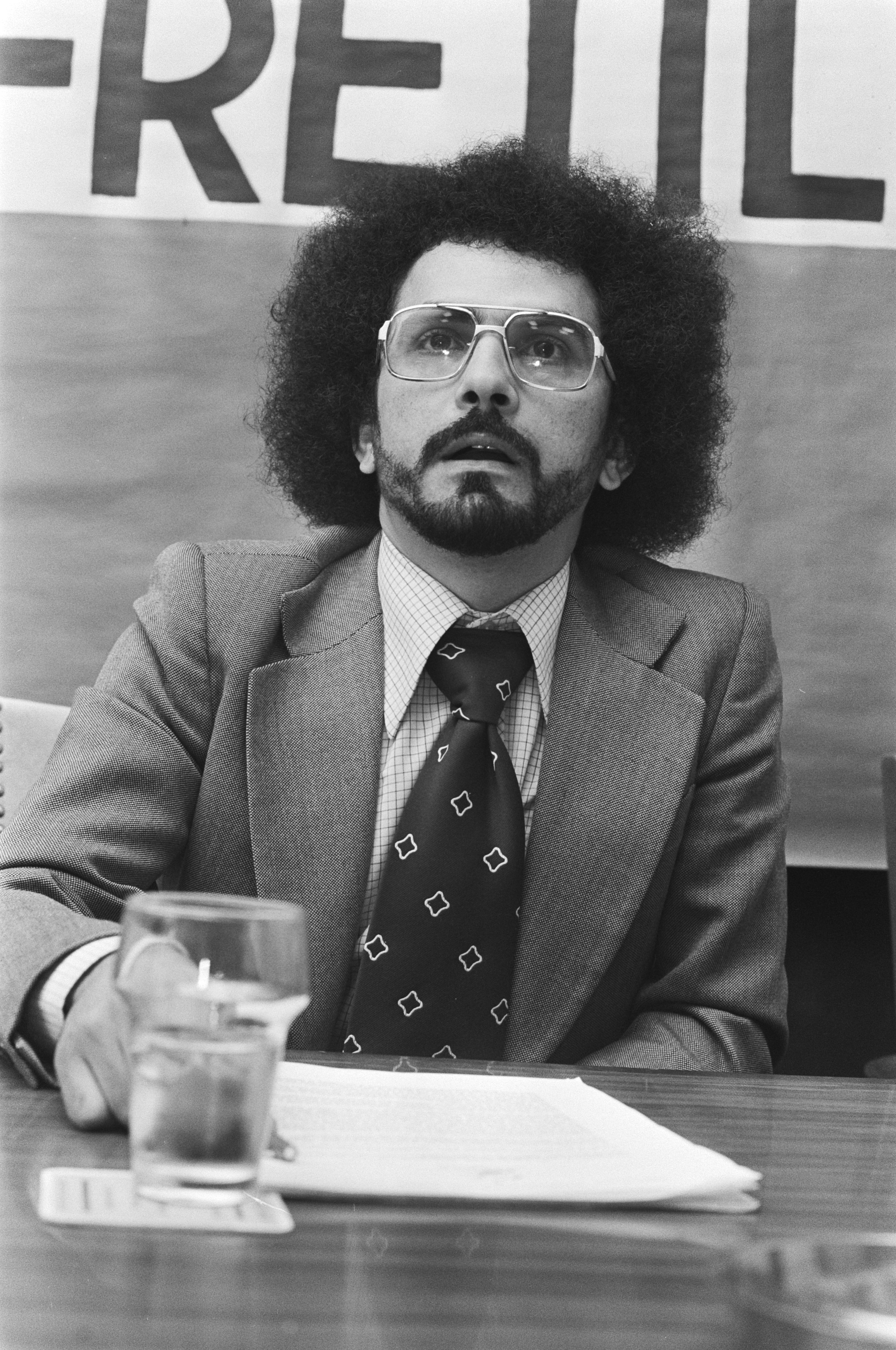 José Ramos-Horta in 1976. Persconferentie met Jose Ramos Horta (Minister Buitenlandse Zaken Oost Timor en secretaris-generaal Frelimo) in Krasnapolsky. Datum 8 juni 1976